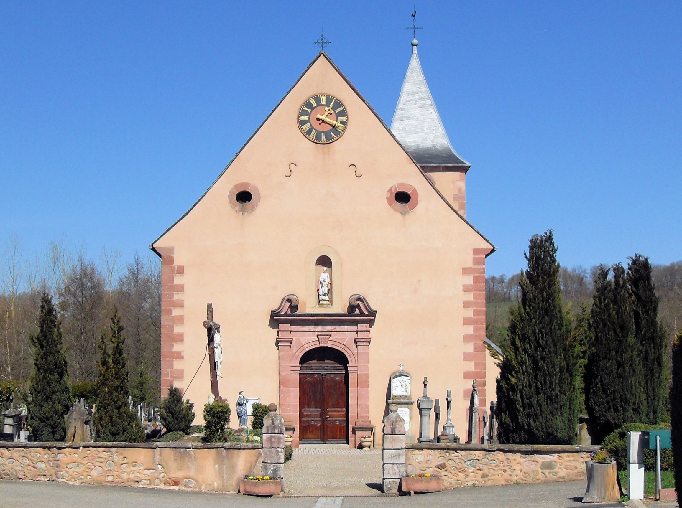 L'église Sainte-Marguerite à Soppe-le-Haut